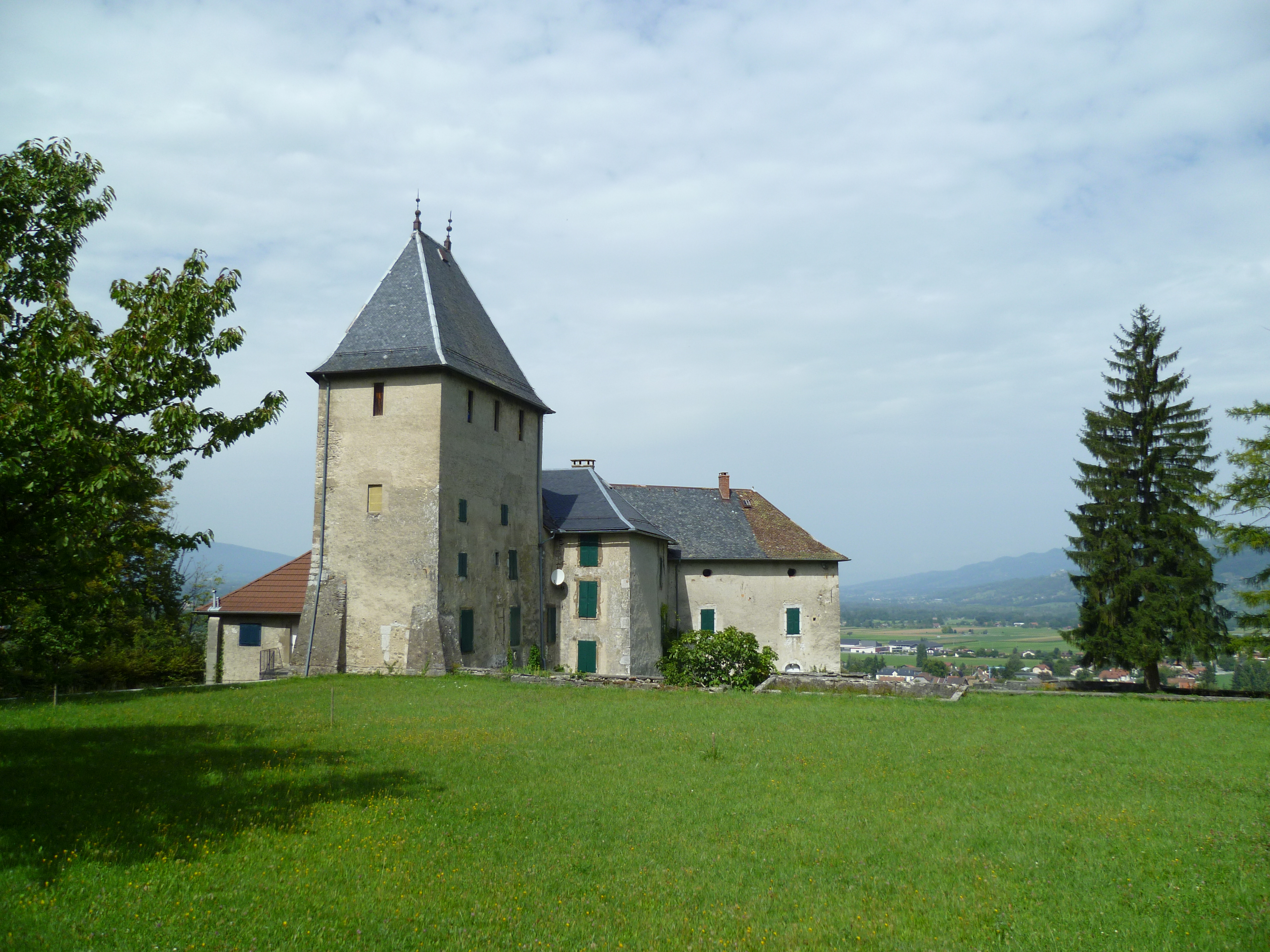 Le Château de Rumilly-sous-Cornillon à Saint-Pierre-en-Faucigny, Haute-Savoie, France.